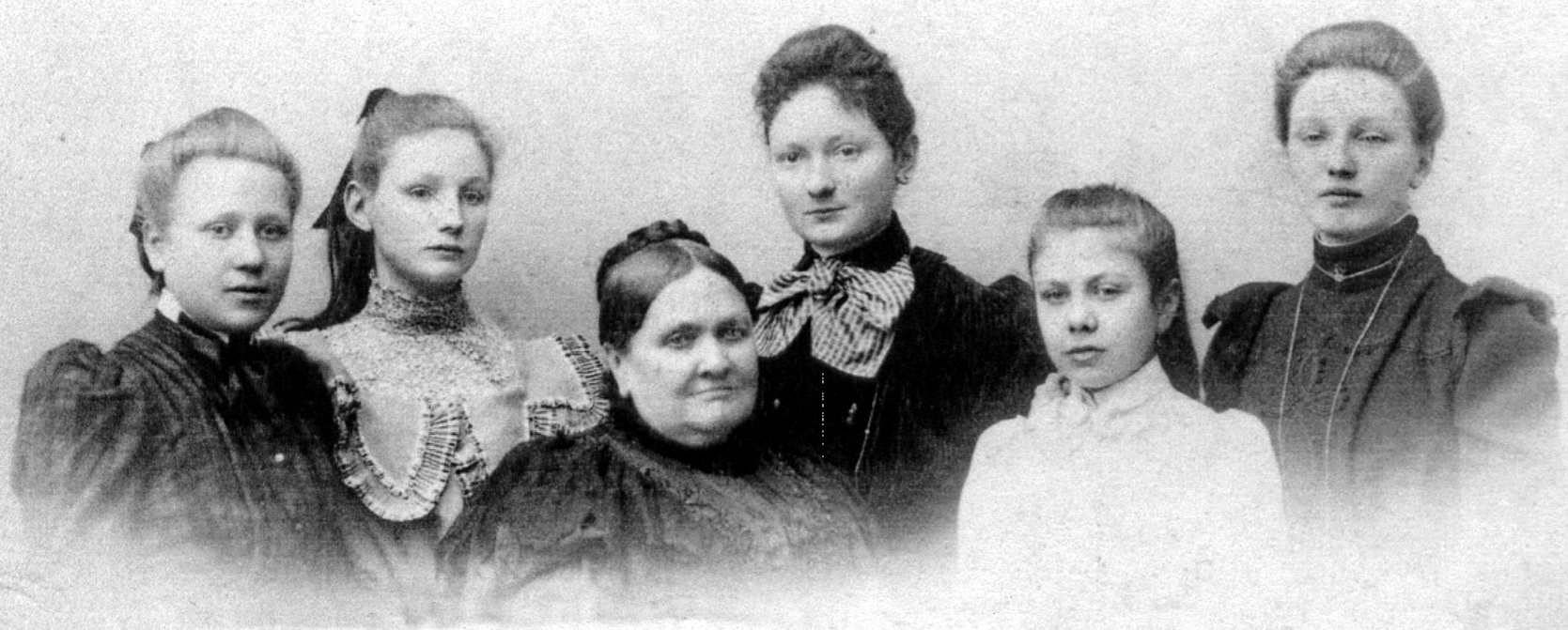 Groepsfoto van Amélie Regout-Polis (1830-1904), echtgenote van de Maastrichtse ondernemer Petrus (II) Regout, en vijf van haar kleindochters. Van links naar rechts: Alice Regout (1882-1920), Maria (Mia) Regout (1883-1963), Bertha Regout (1877-1969), Joséphine (Phina) Regout (1886-1973) and Amélie (Lili) Regout (1881-1947).